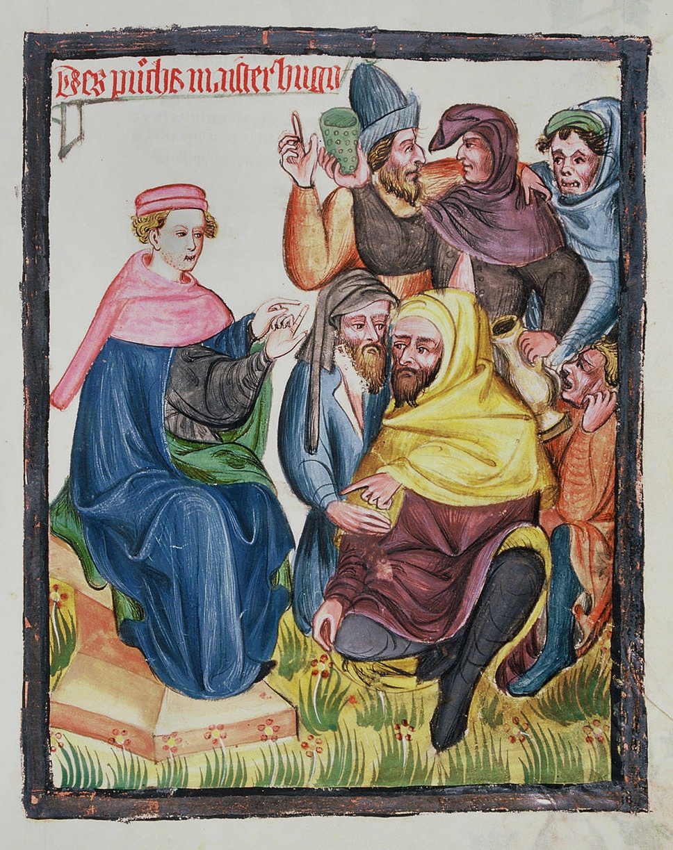 Autorenbild Hugo von Trimberg, UB Leiden, VGG F 4, Bl. 25r